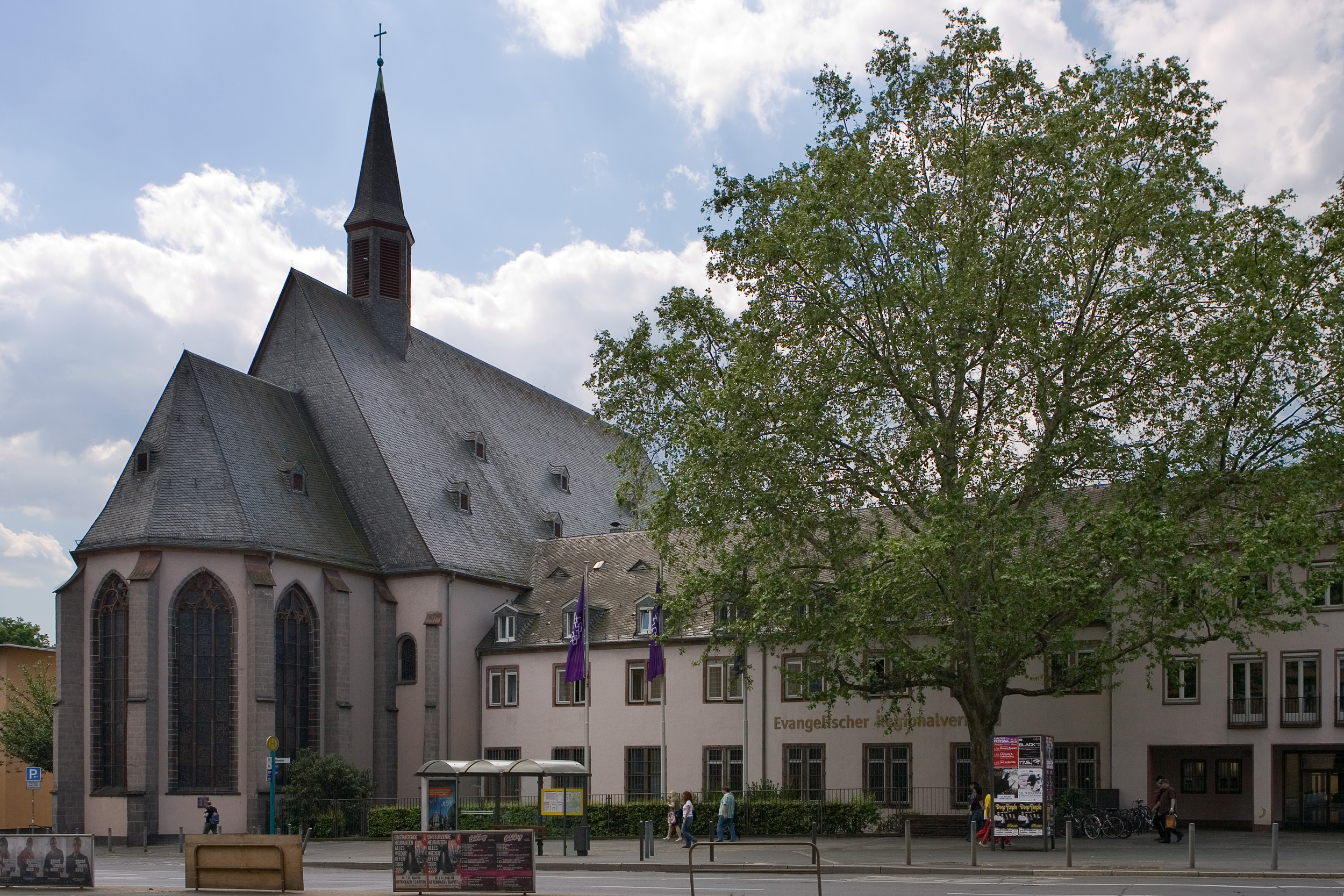 Heilig-Geist-Kirche mit dem Chor der ehemaligen Dominikanerkirche und Annex-Klosterbauten aus der Nachkriegszeit in Frankfurt am Main, aus östlicher Richtung von der Ecke Battonnstraße / Kurt-Schumacher-Straße aus gesehen. Selber fotografiert im Mai 2008, Doppellizensierung GFDL & CC-BY-SA 2.5.